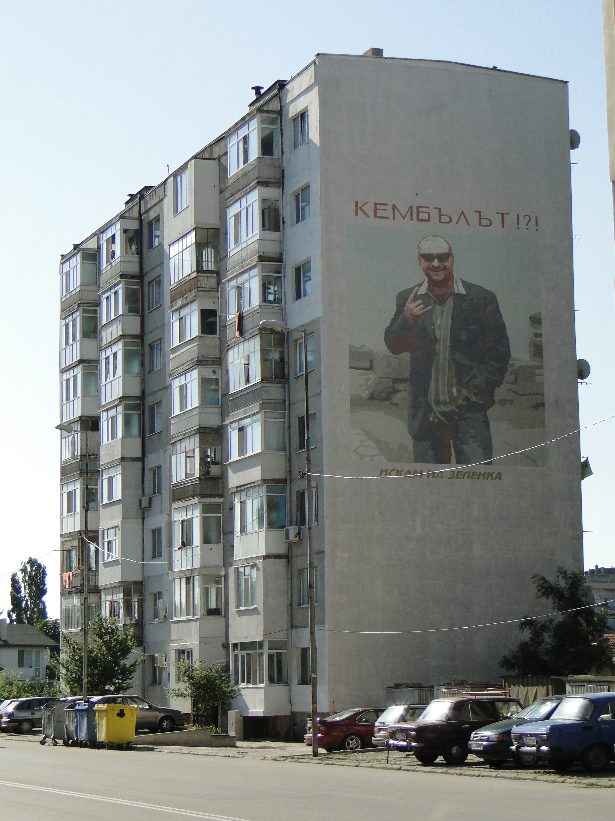 Каварна